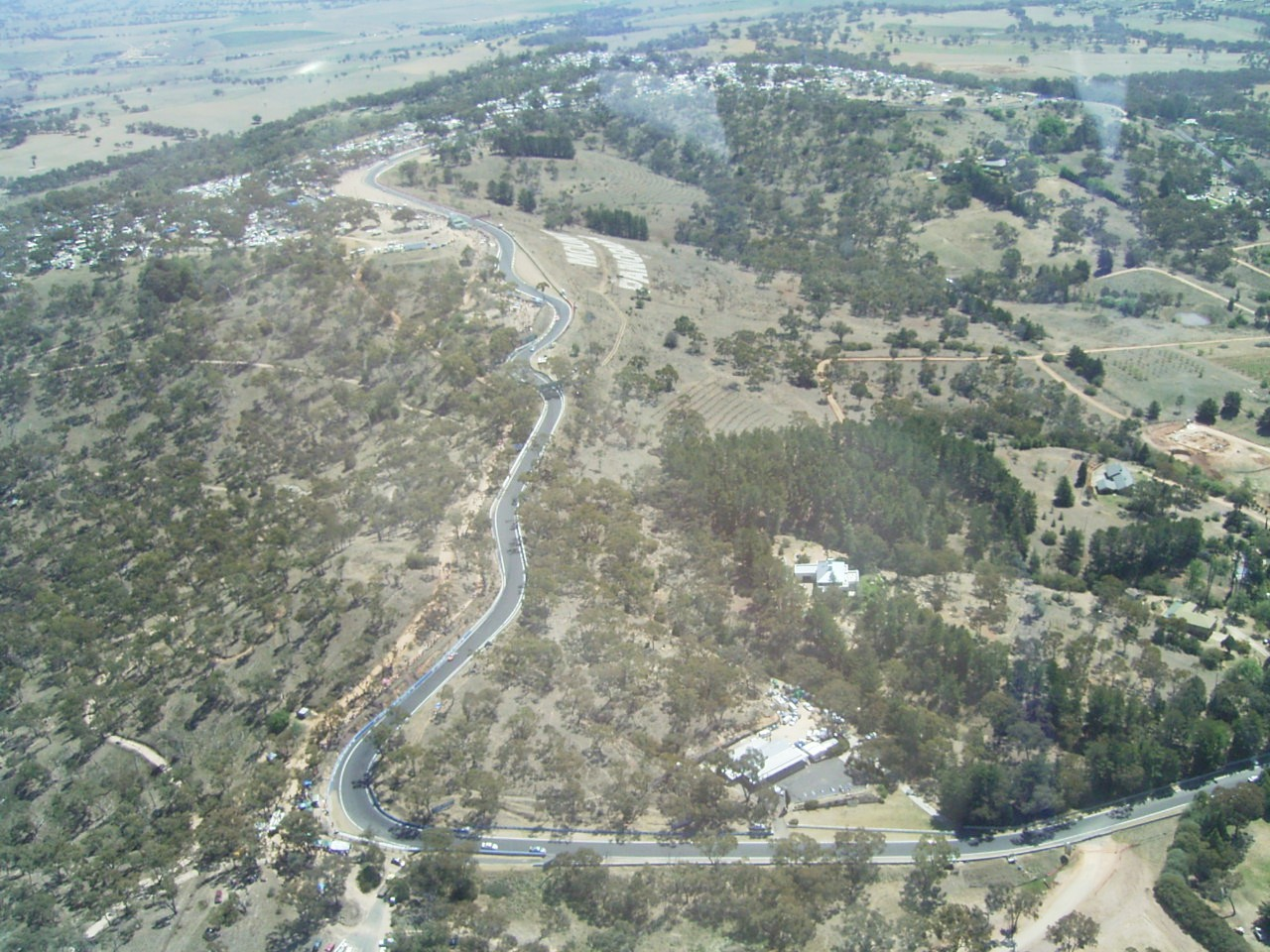 Forest elbow